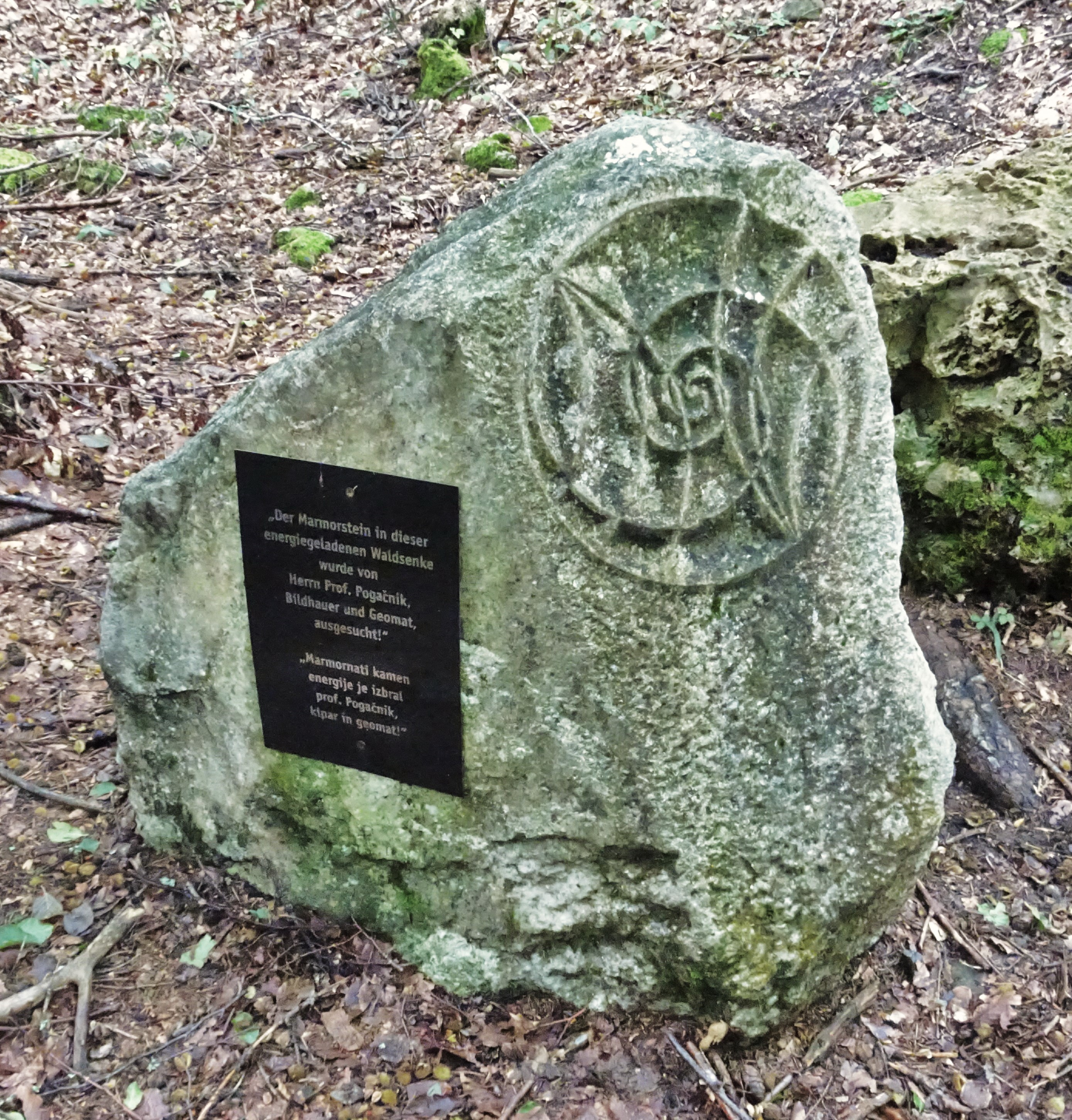 Skulptur von Pogacnik in Rupertiberg (Ludmannsdorf)